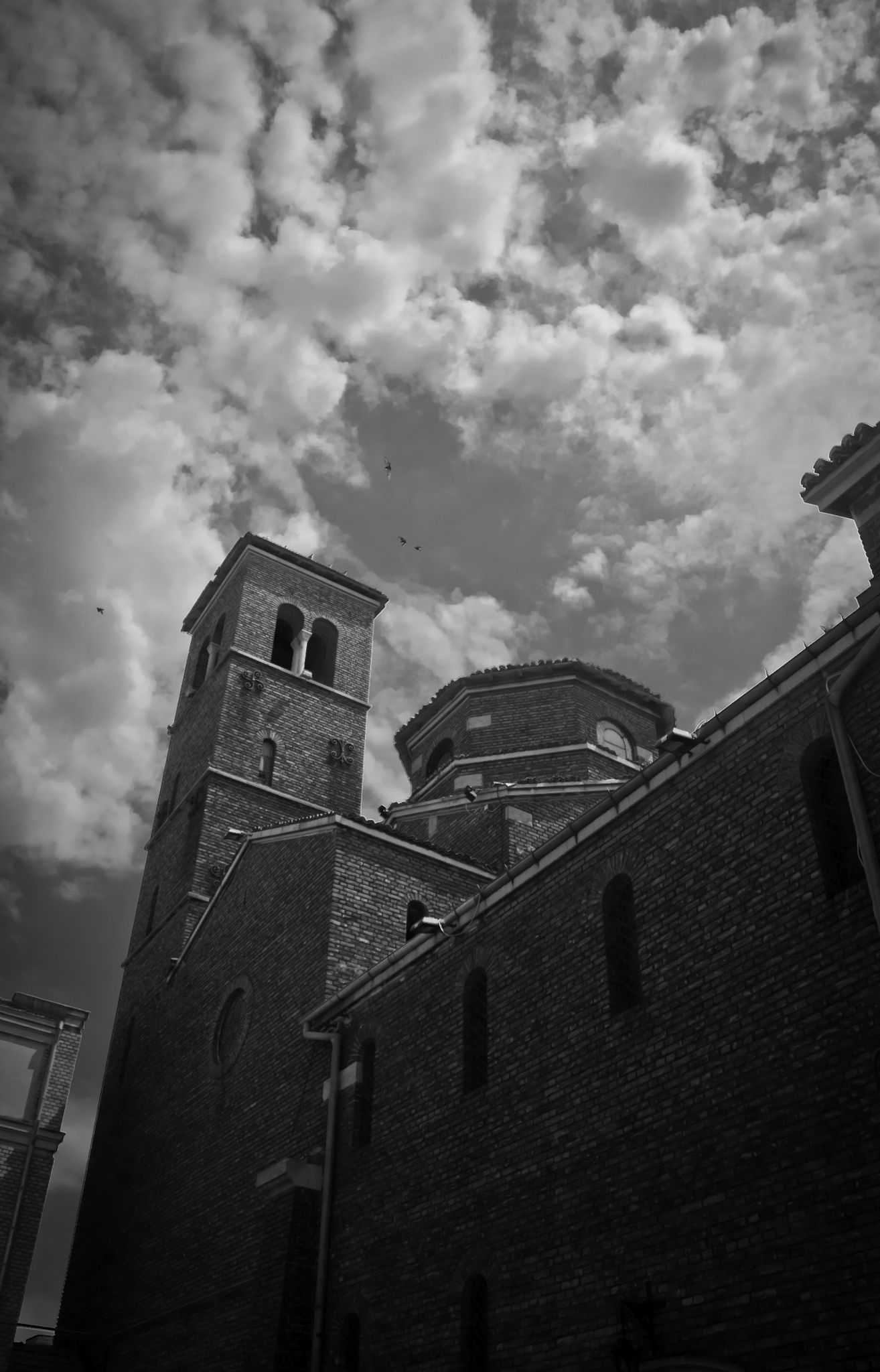 Biserica catolică "Sf. Anton"